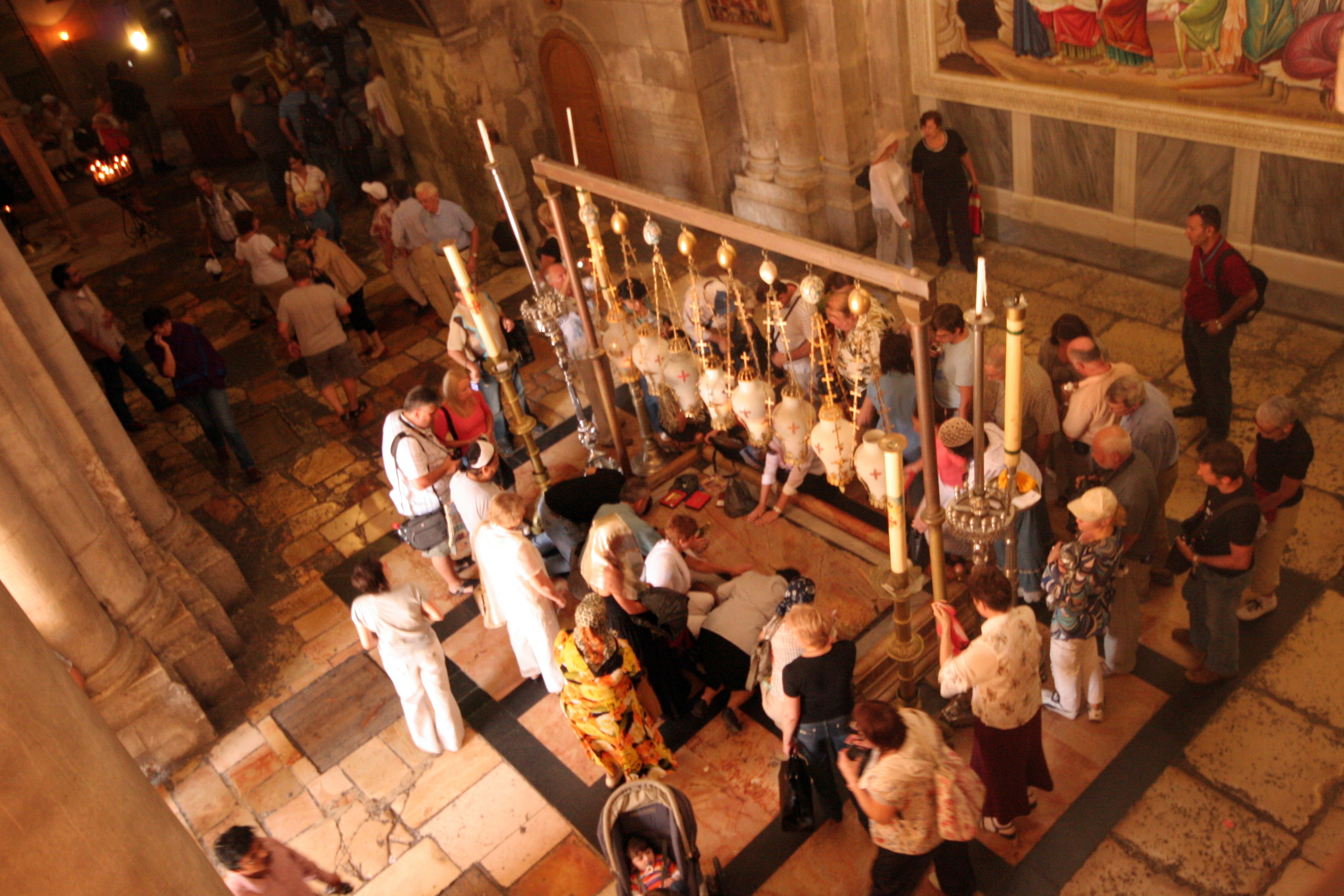 Israel, Jerusalém - Igreja do Santo Sepulcro. Altar da Crucificação Jerusalem